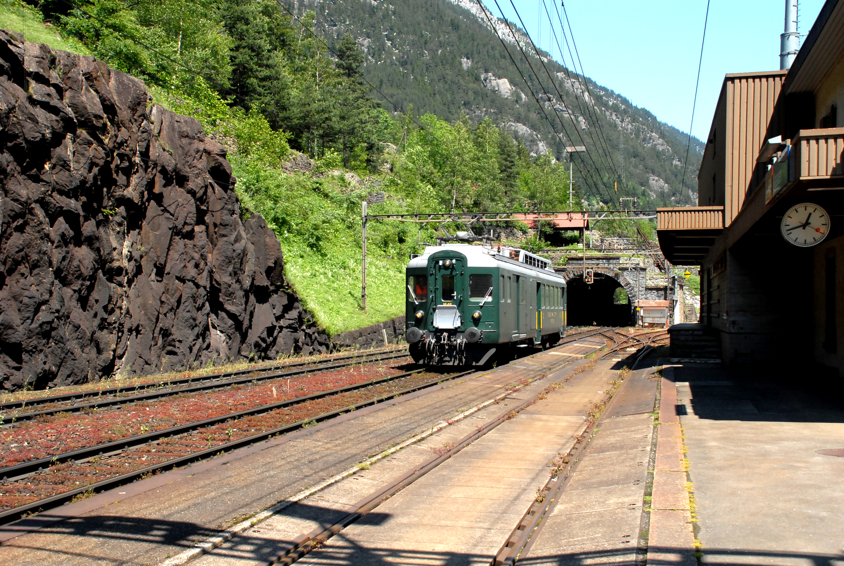 SBB treinstel BDe 4/4 nr: 1646 werd gebruikt voor Video opnames vanuit de stuurstand op het traject Erstfeld - Göschenen te Wassen.